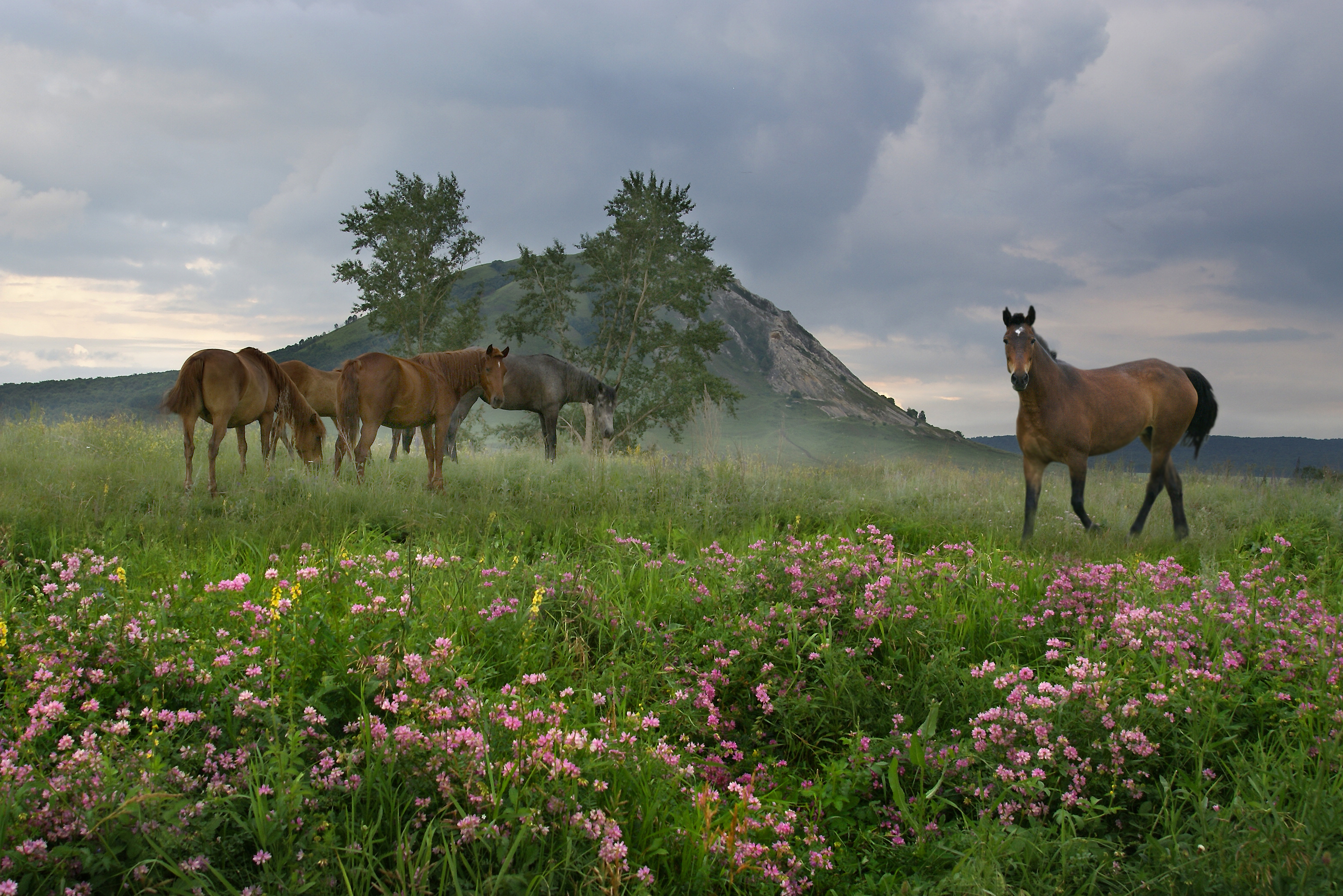 Гора Тра-тау, Ишимбайский район This image is related to the protected area of Russia number 0210153